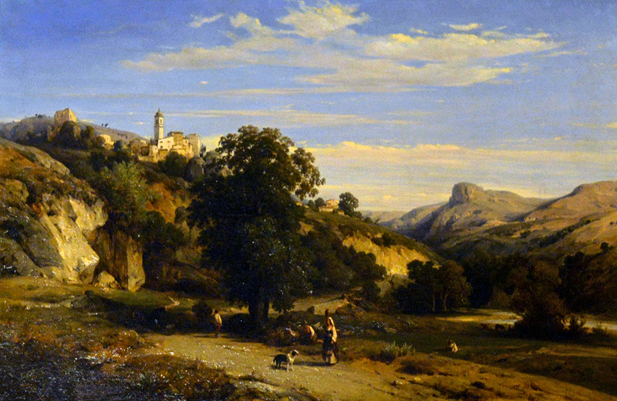 Vue du village de Cagnes, près d'Antibes par François Antoine Léon Fleury